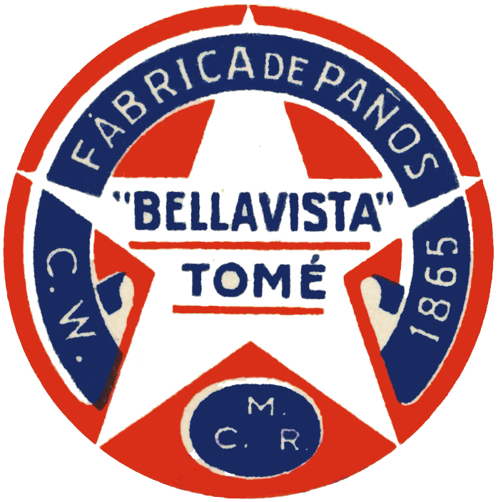 Identificador gráfico de la fábrica Bellavista Tomé fundada en 1865 por el industrial Guillermo Délano.